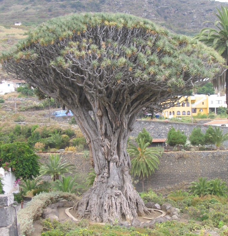 Dracaena draco Drago milenario de Icod de los vinos, isla de Tenerife, Canarias, España.